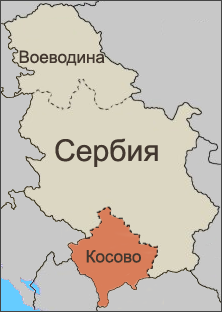 Косово в составе Сербии. Перевод карты с Викисклада